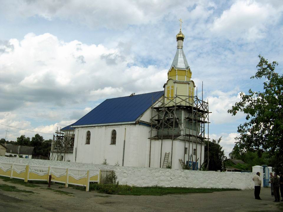 Беларуская (тарашкевіца): Воўчын